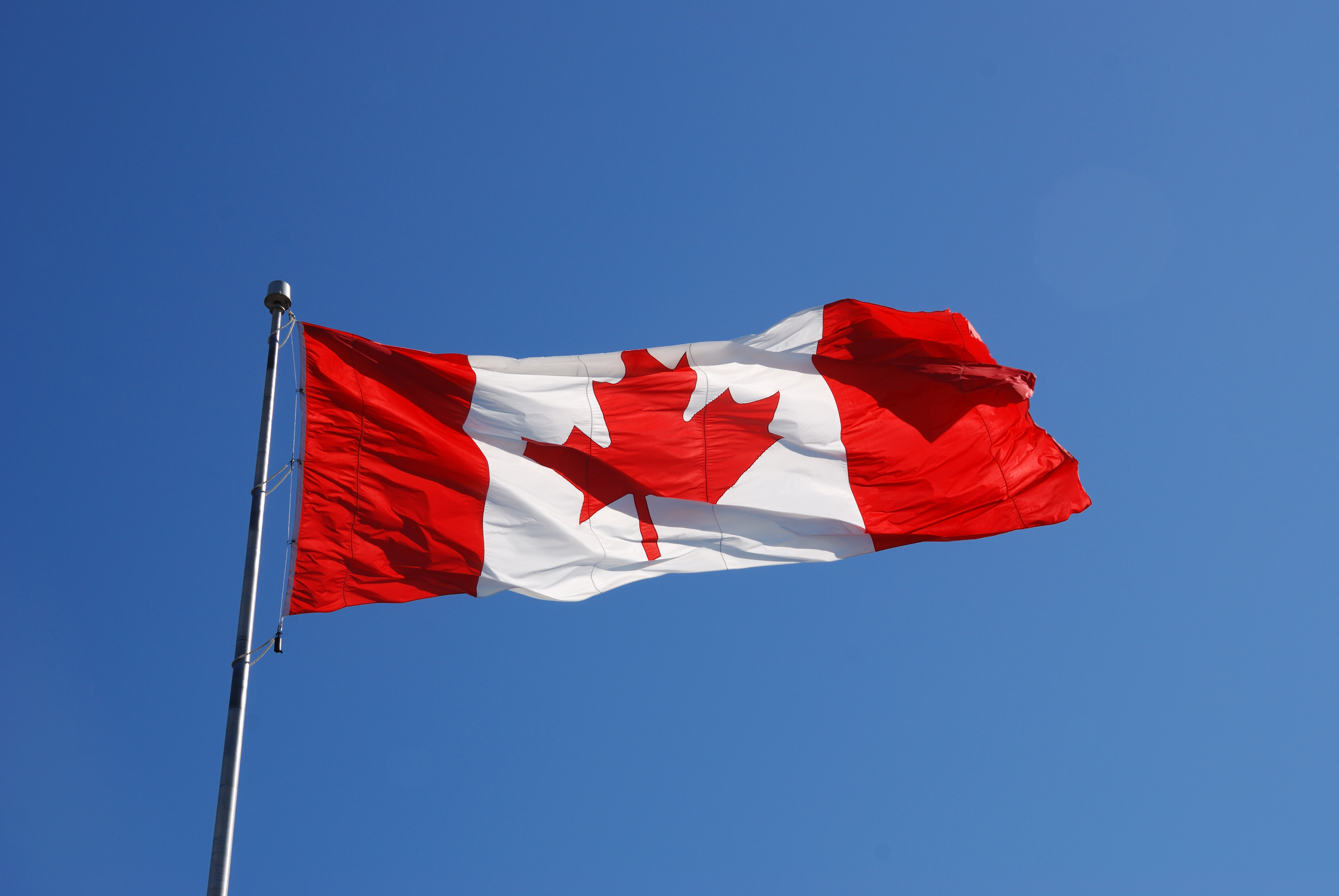 Wehende Flagge Kanadas (in Halifax aufgenommen)